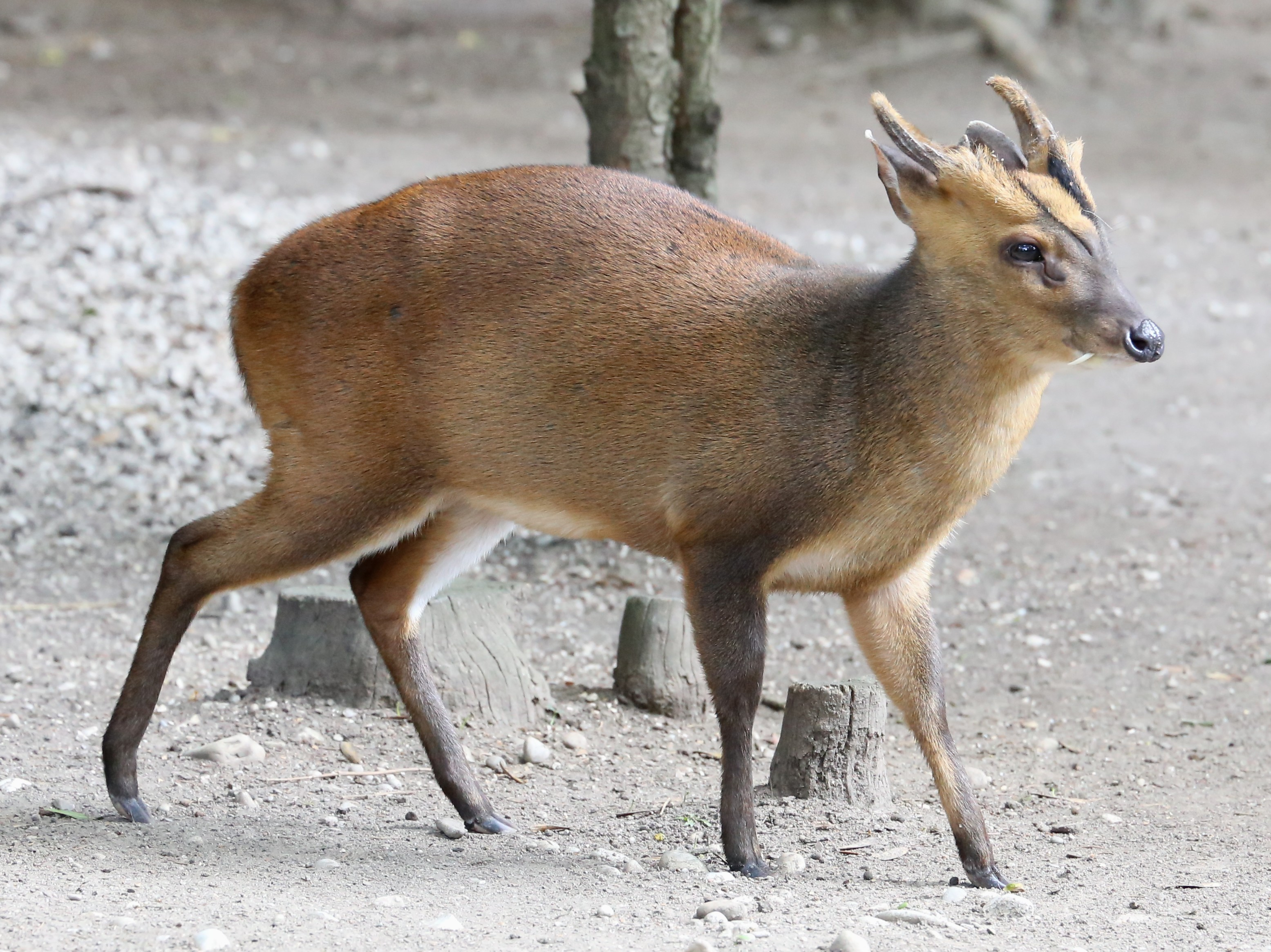 Chinesischer Muntjak, Muntiacus reevesi, Zoo Augsburg